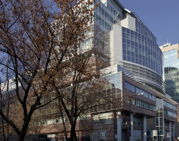 siedziba firmy Liberty Direct